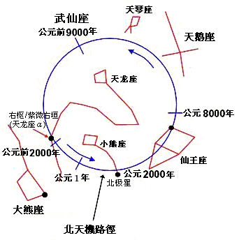 I create this figure in PowerPoint using a couple of sources. The original base graph was an awful jpeg compressed too many times to the point of illegibility. translate from en